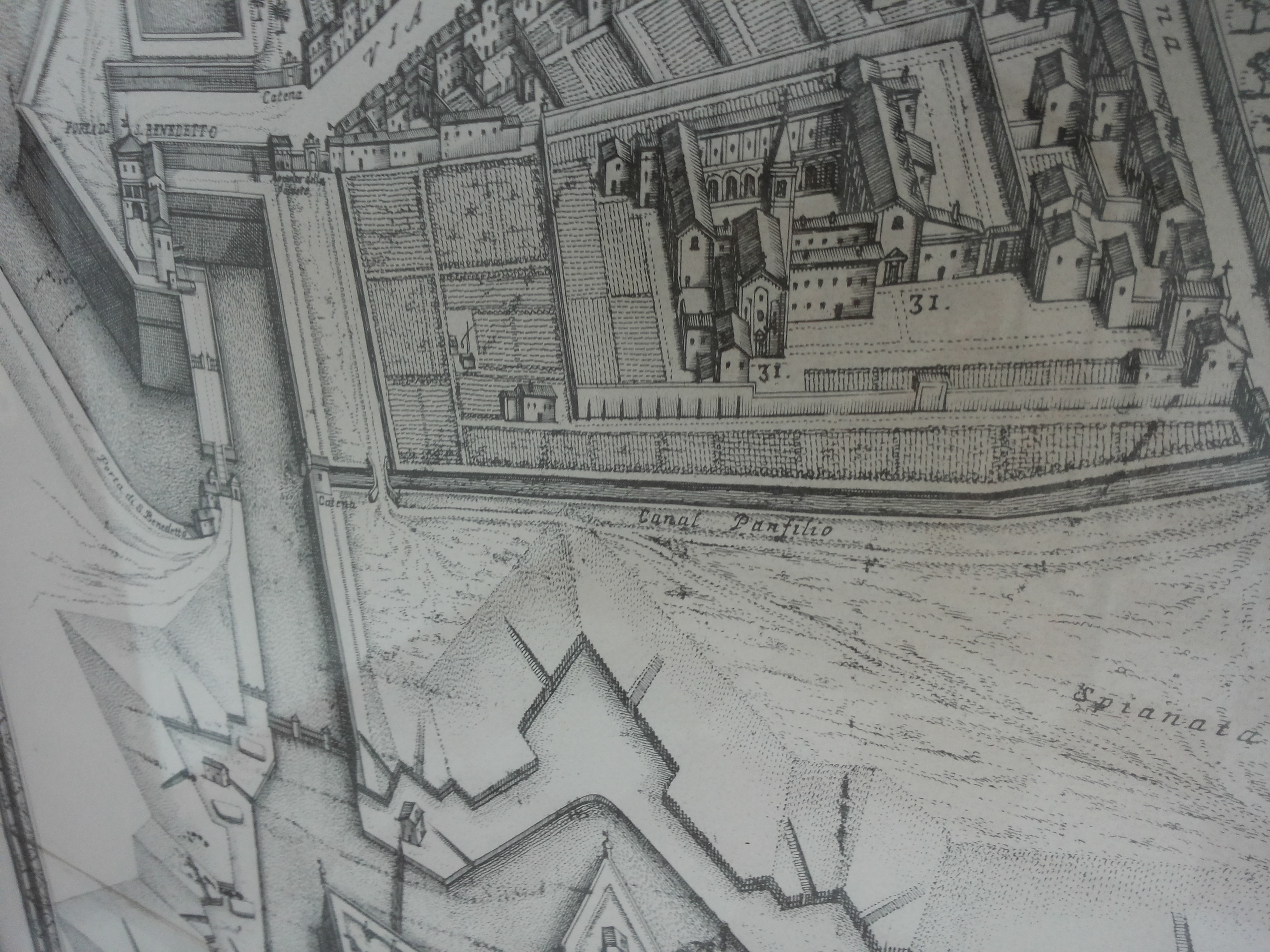 31. S. Gabriele Monache Carmelitane, monastero sopresso nel 1796, si trovava nell'attuale Viale Cavour nell'area dove ora c'è il Palazzo INPS